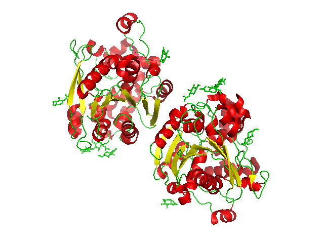 Gastric lipase